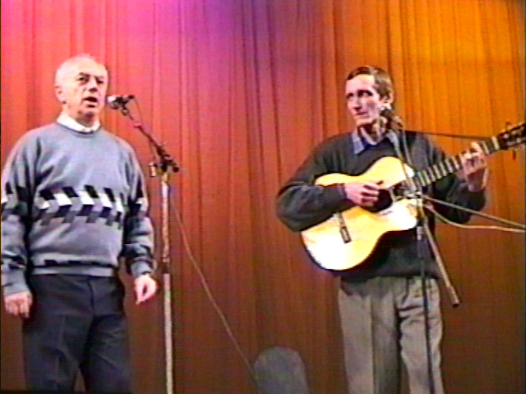 А. Городницкий и А. Костромин